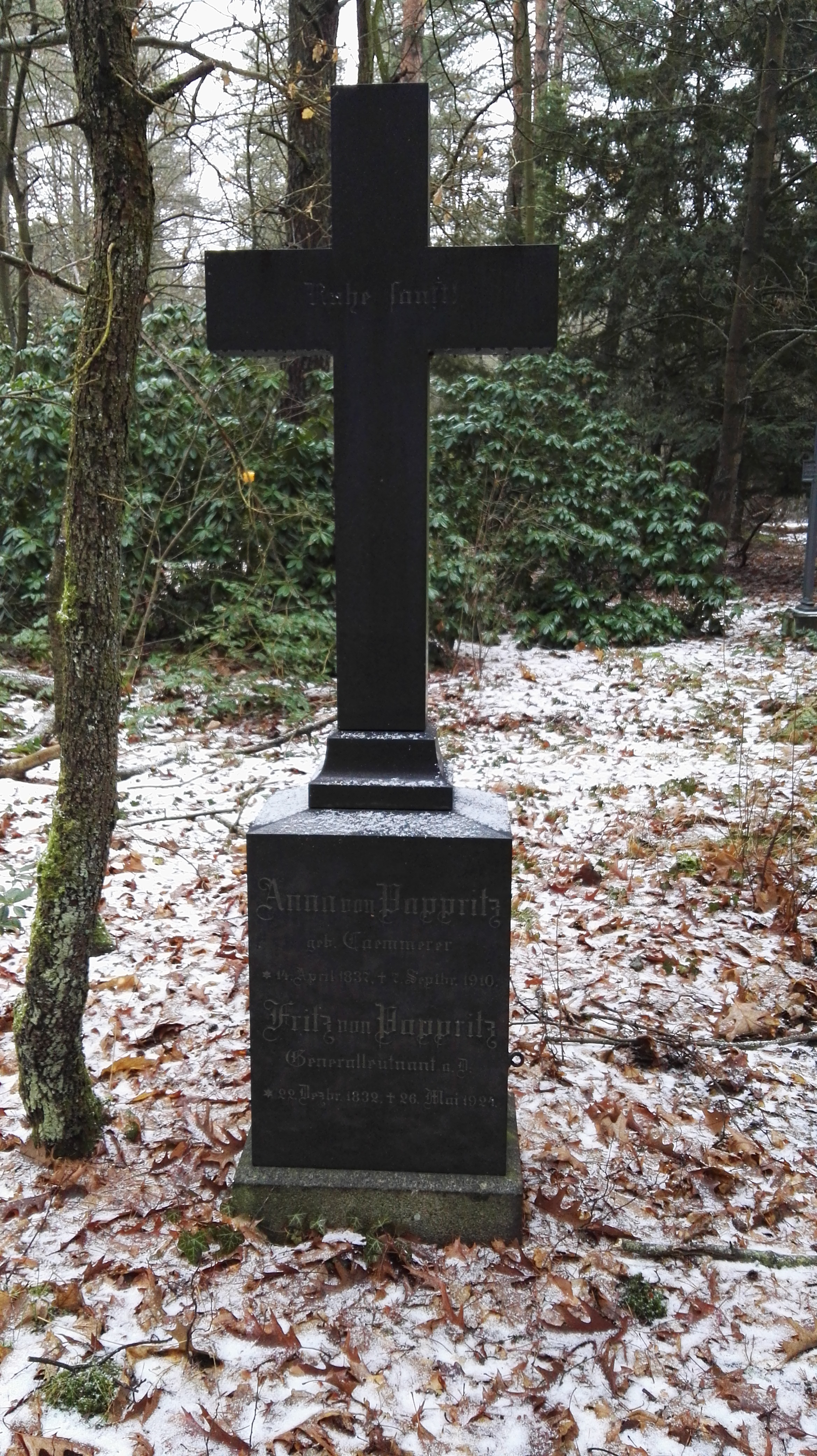 Grab von Fritz von Pappritz auf dem Südwestkirchhof Stahnsdorf